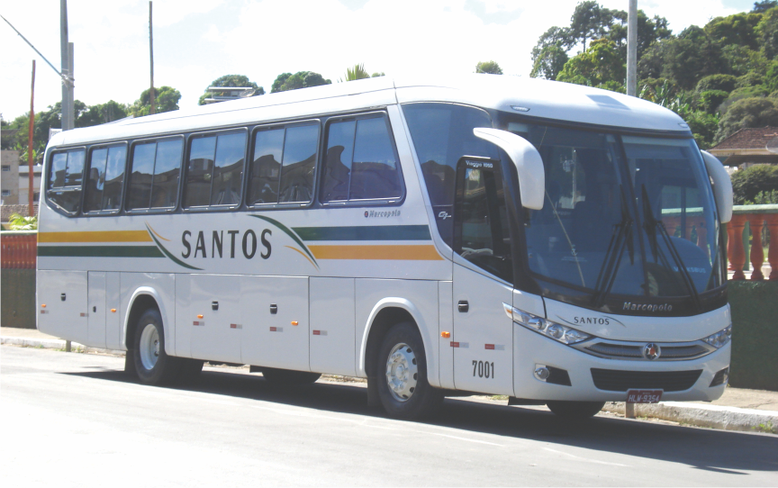 Ônibus rodoviário convencional da empresa Viação Santos, número de ordem 7001, na linha intermunicipal prefixo 3714 (Bicas / Juiz de Fora / Bicas).